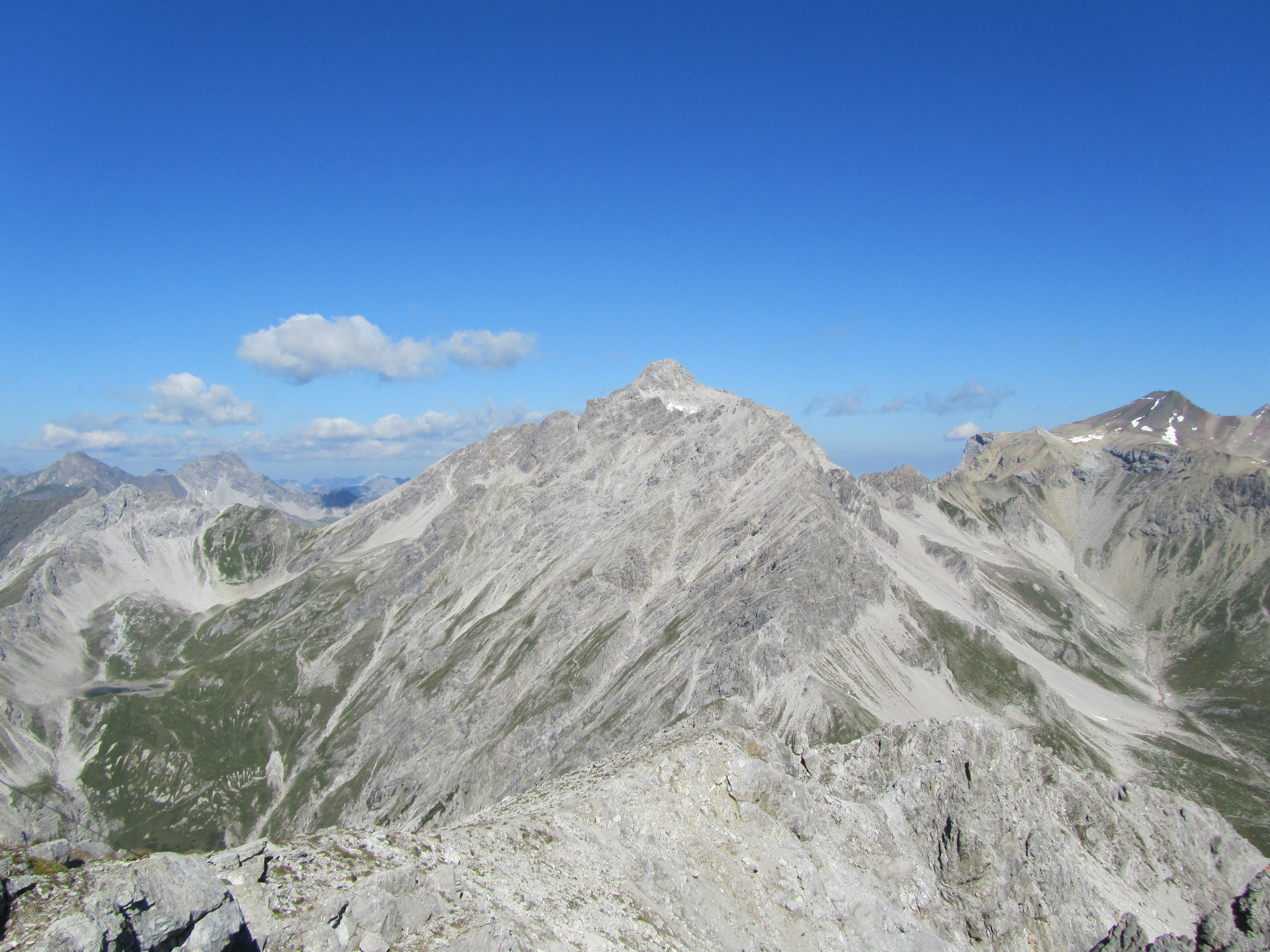 Die Vorderseespitze in den Lechtaler Alpen von Südosten (Samspitze)